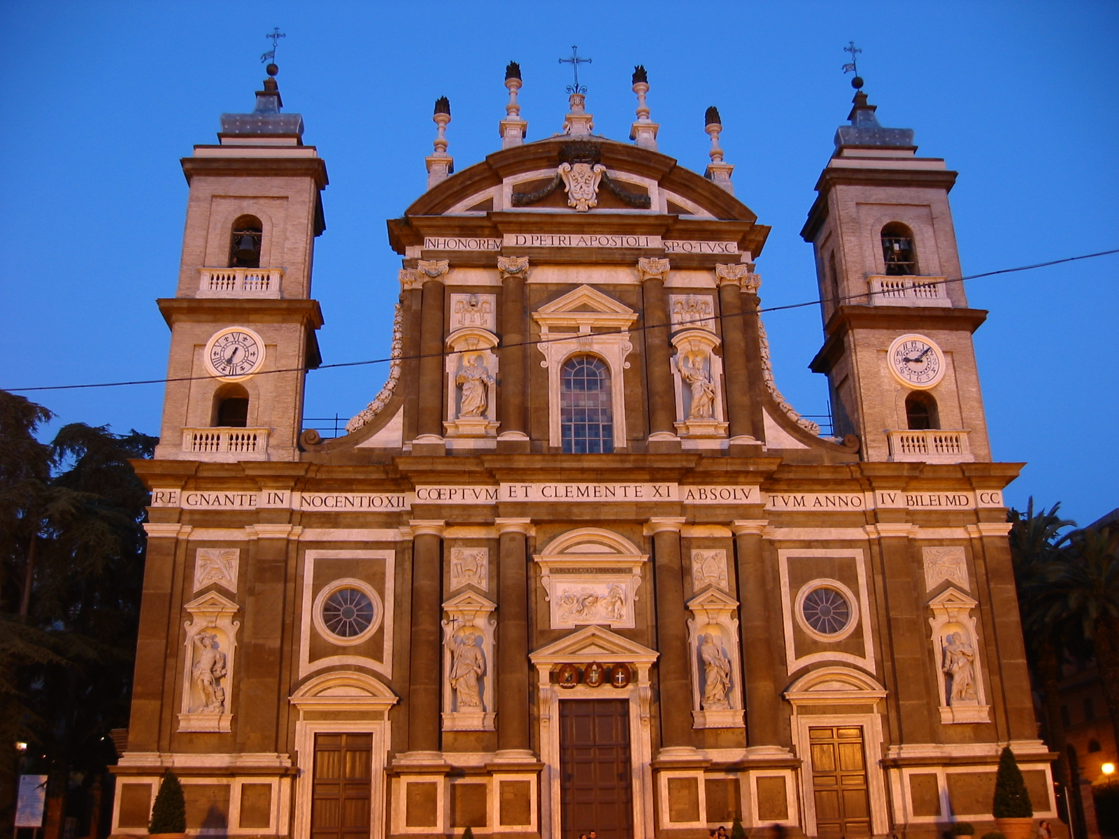 Frascati, Lazio, Italia